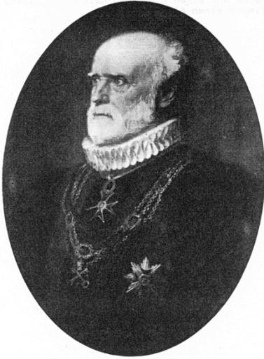 Portrait von Dr. jur Adam Bock (Scan eines Gemäldes Öl auf Leinwand)